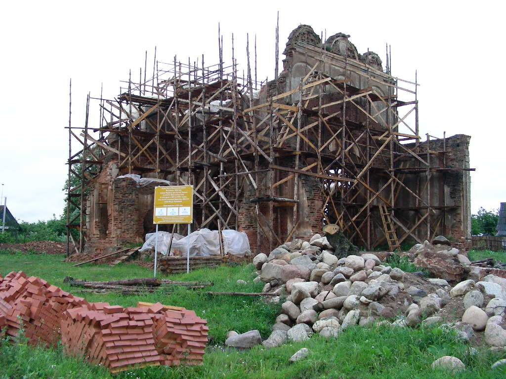 Беларуская (тарашкевіца): Ансамбль былой сядзібы: жылы дом скарбніца флігель паўночная ўязная брама гаспадарчыя пабудовы рэшткі Сьвята-Мікалаеўскай царквы валун воданапорная вежа парк альтанка. в. Станькава This is a photo of Belarusian heritage monument. Reference number: 613Г000144 ( WLM)